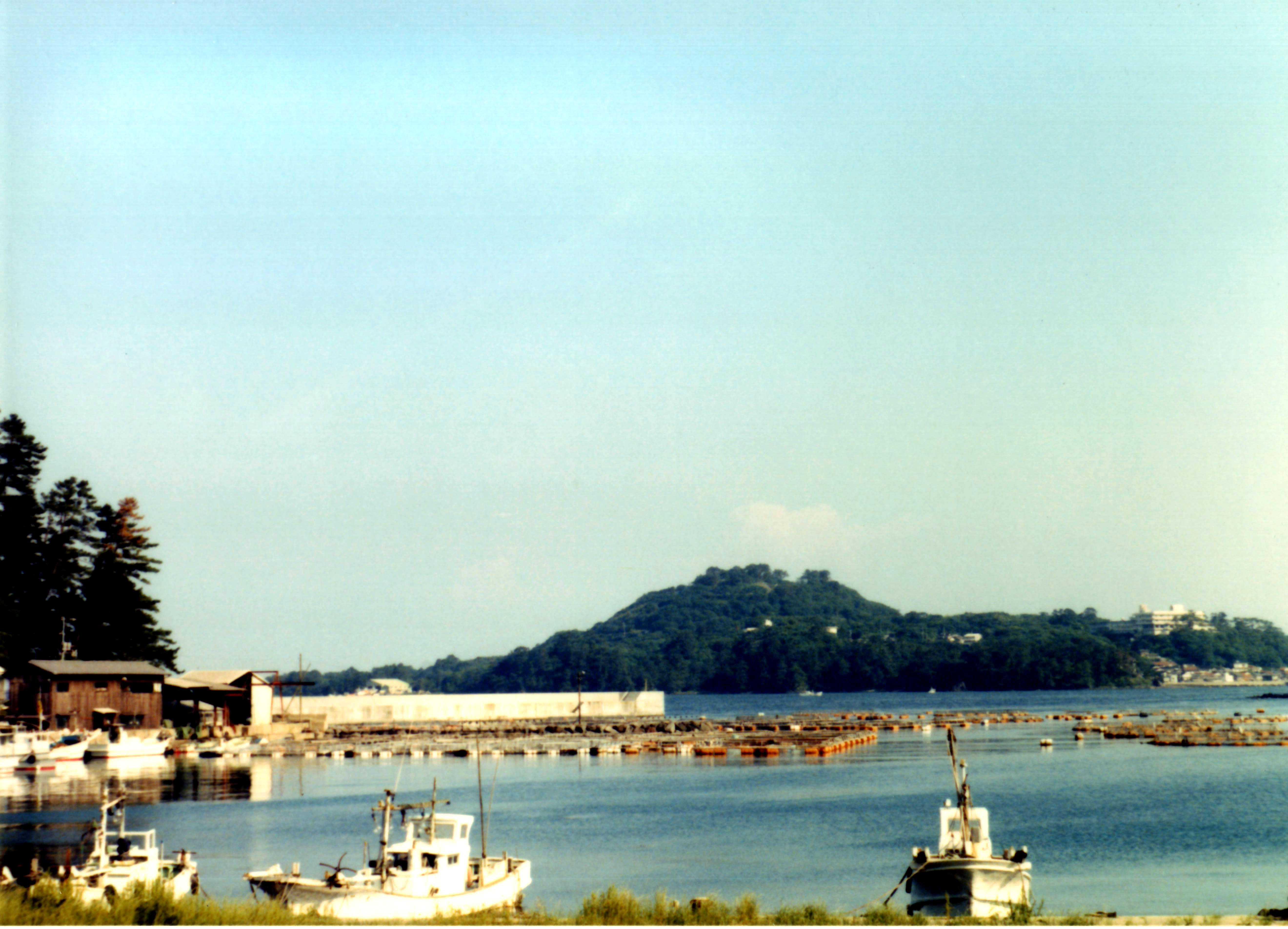 Mt. Kasa(Kasayama) is the world's smallest volcano in Hagi, Yamaguchi, Japan.